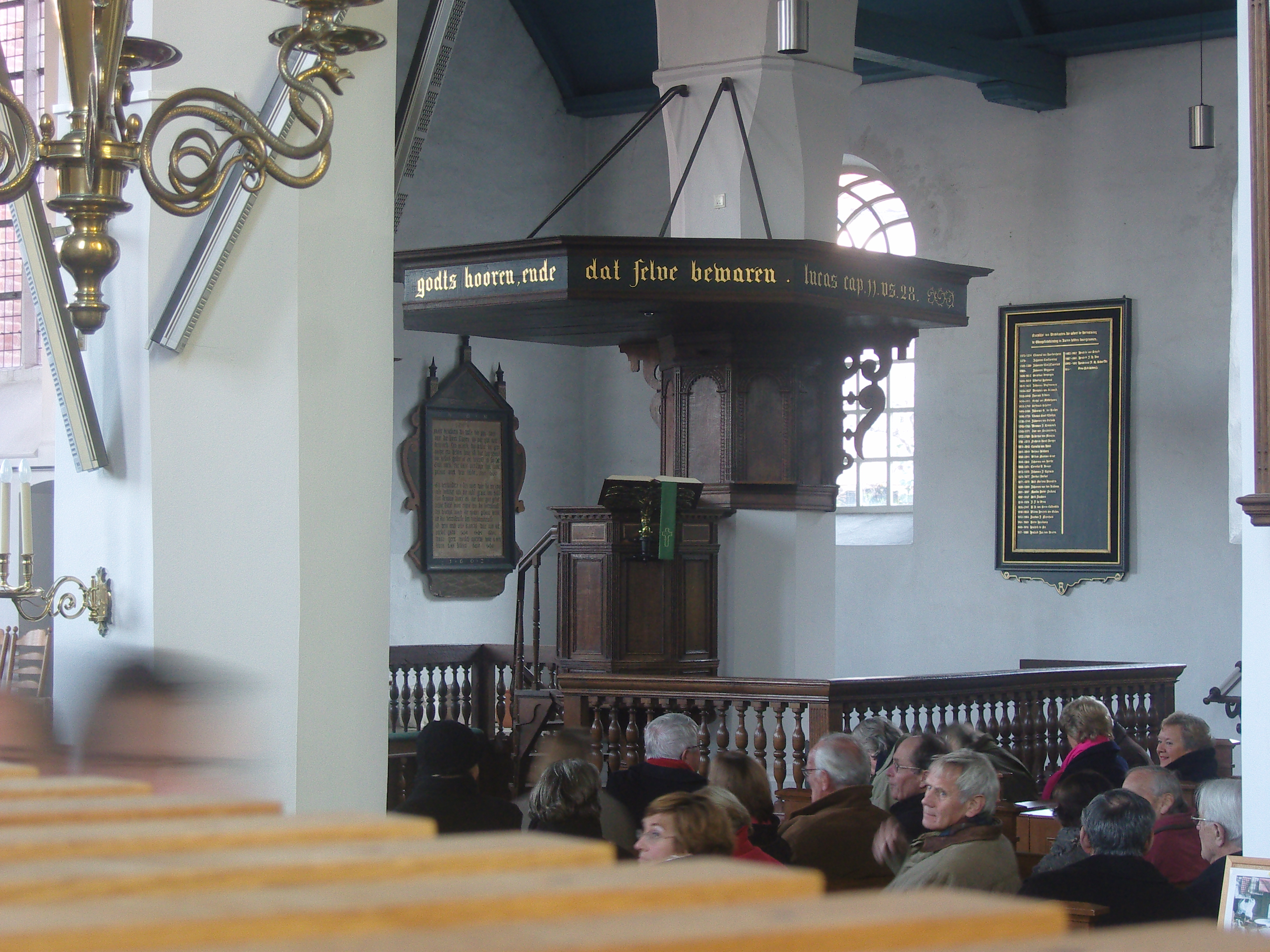 De preekstoel in de St. Lambertuskerk in Buren.